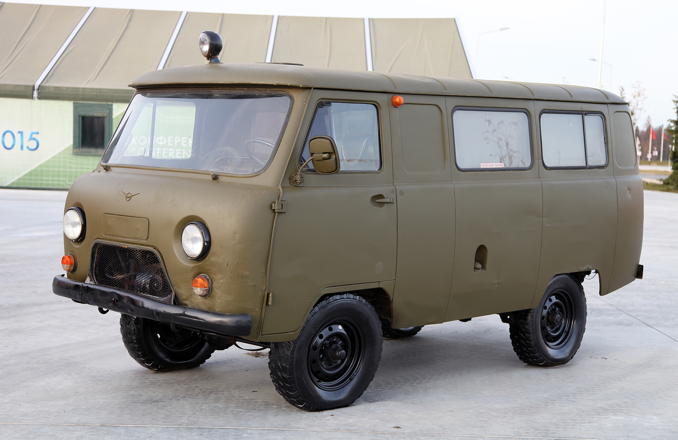 УАЗ-452 (UAZ-452)